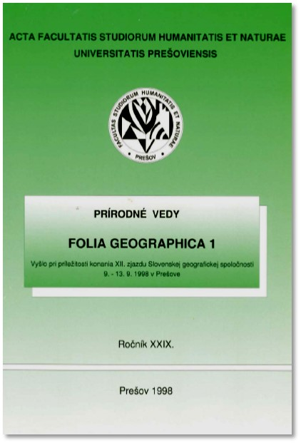 Obálka prvého čísla časopisu